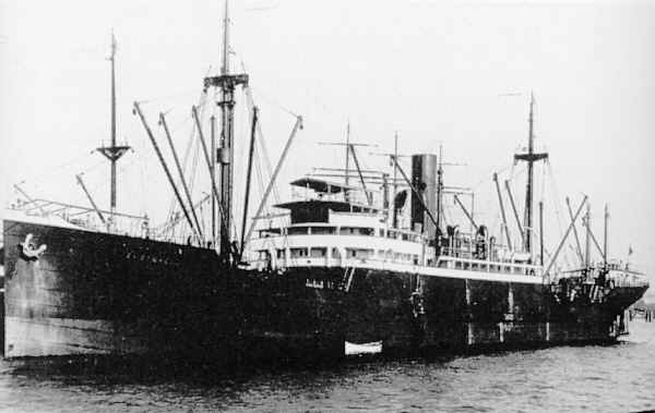 Das Frachtschiff ELBERFELD des NDL